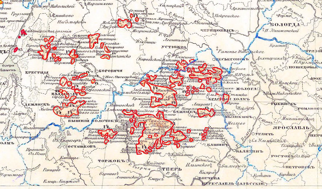 Область расселения тверских карел в России XIX века.